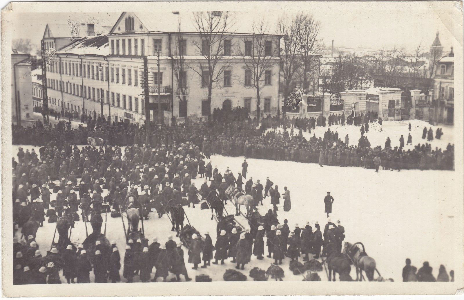 Беларуская (тарашкевіца): Менск (Miensk), рог пляцу Высокага Рынку (Vysoki Rynak) і вуліцы Койданаўскай (vulica Kojdanaŭskaja)